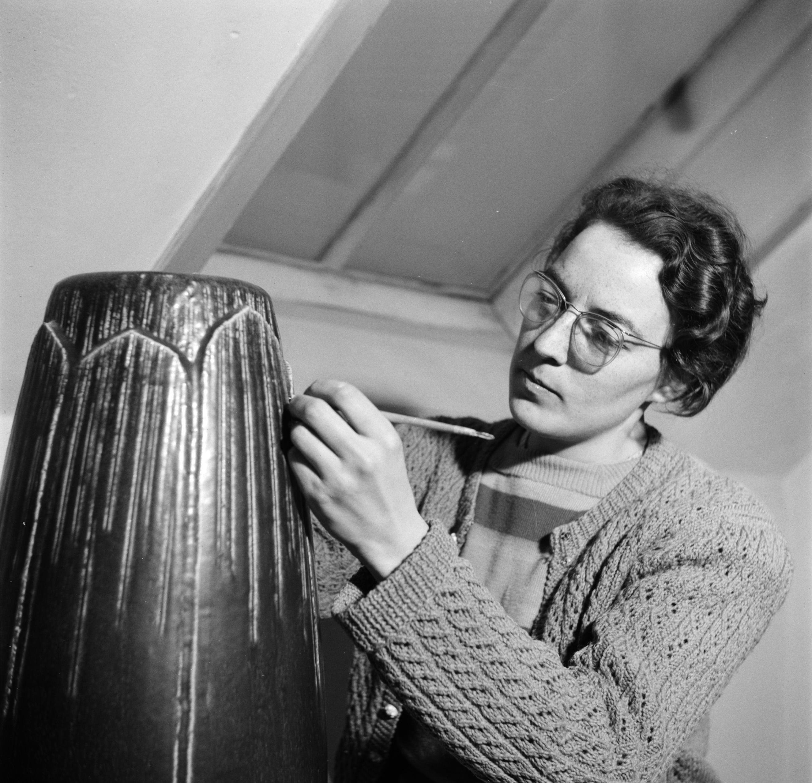 Collectie / Archief : Fotocollectie Van de Poll Reportage / Serie : Pottenbakkerij Saxbo Beschrijving : Vermoedelijk Eva Staer-Nielsen bezig met het decoreren van een vaas Datum : maart 1954 Locatie : Denemarken, Kopenhagen Trefwoorden : aardewerk, creativiteit, gereedschappen, keramiek, kunst, pottenbakkers Persoonsnaam : Staer-Nielsen, Eva Fotograaf : Poll, Willem van de, [onbekend] Auteursrechthebbende : Nationaal Archief Materiaalsoort : Negatief (zwart/wit) Nummer archiefinventaris : bekijk toegang 2.24.14.02 Bestanddeelnummer : 252-8896